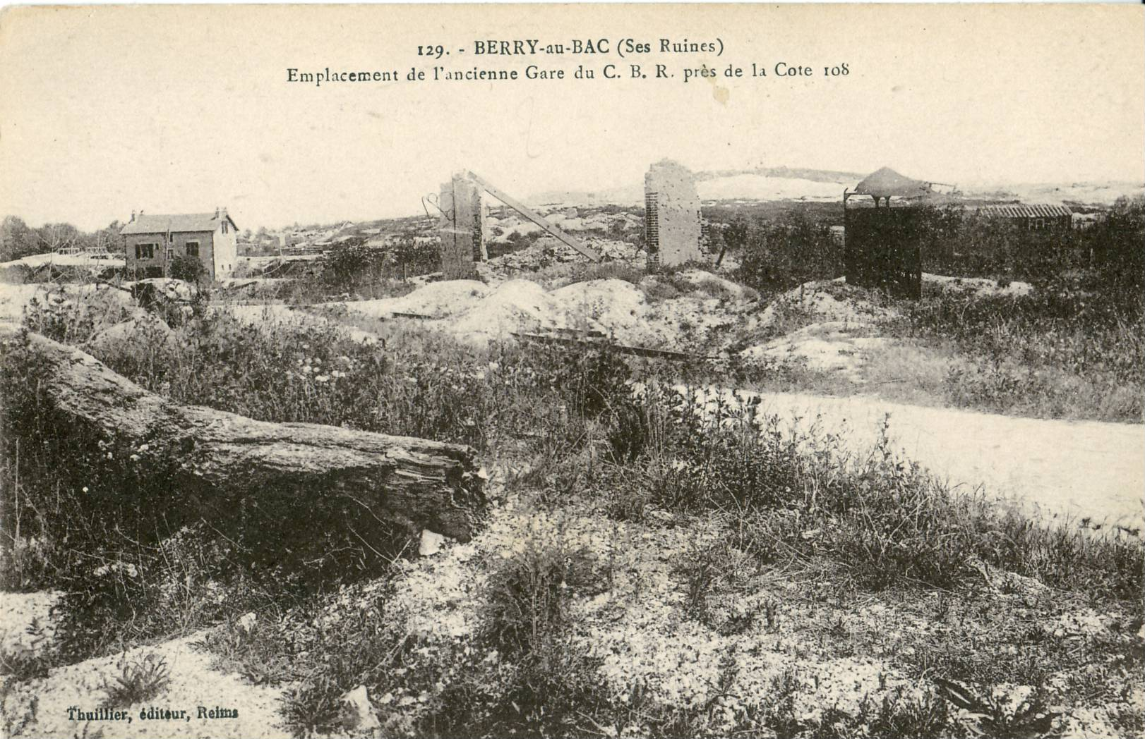 Carte postale ancienne éditée par Thuillier, N°129BERRY-au-BAC - Emplacement de l'ancienne gare du C.B.R. près de la Cote 108Chemins de fer de la Banlieue de Reims : Ligne Soissons - Rethel .